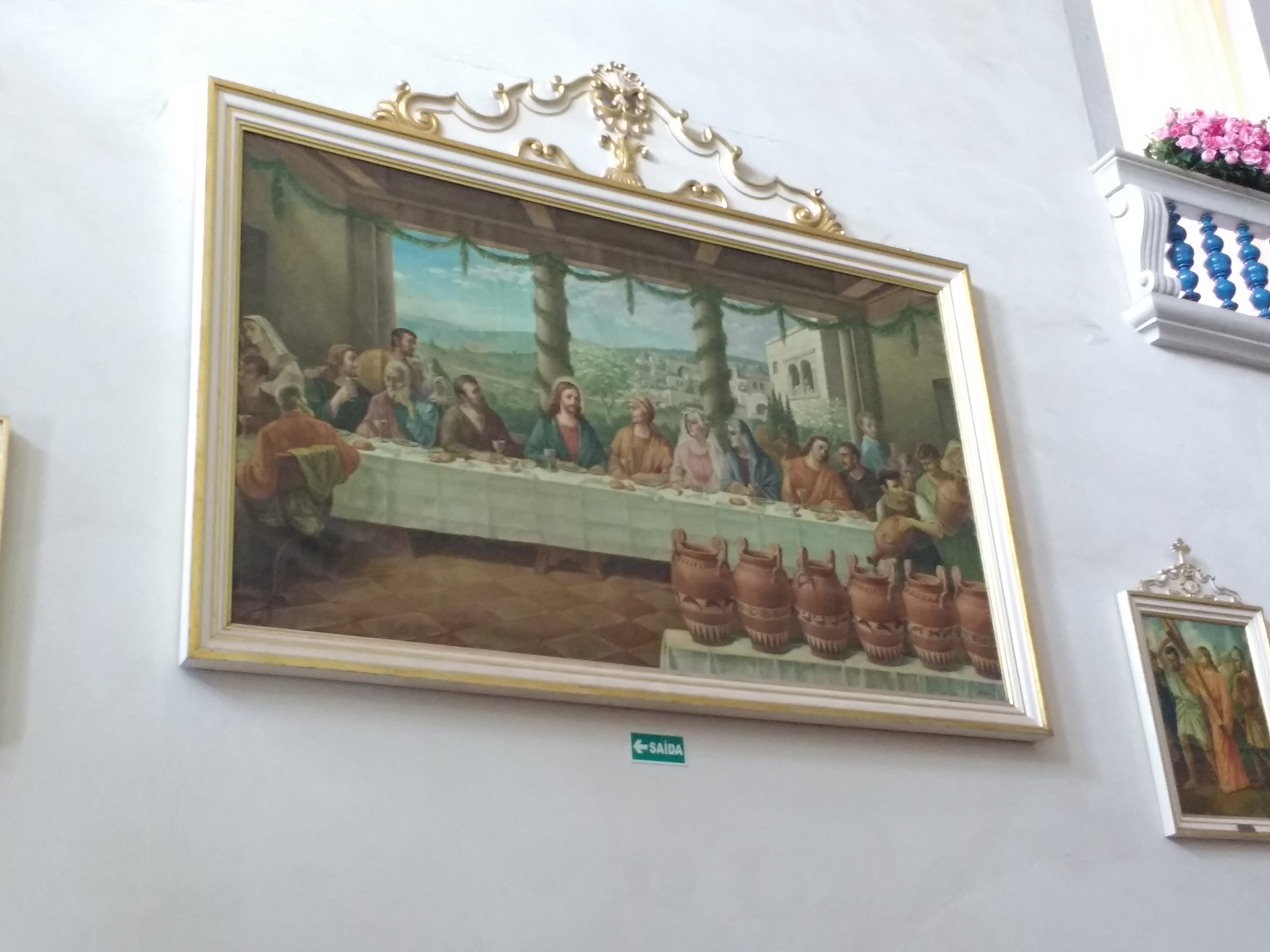 Quadro de Bruno de Giusti - Ig. Mãe dos Homens de Porto Feliz